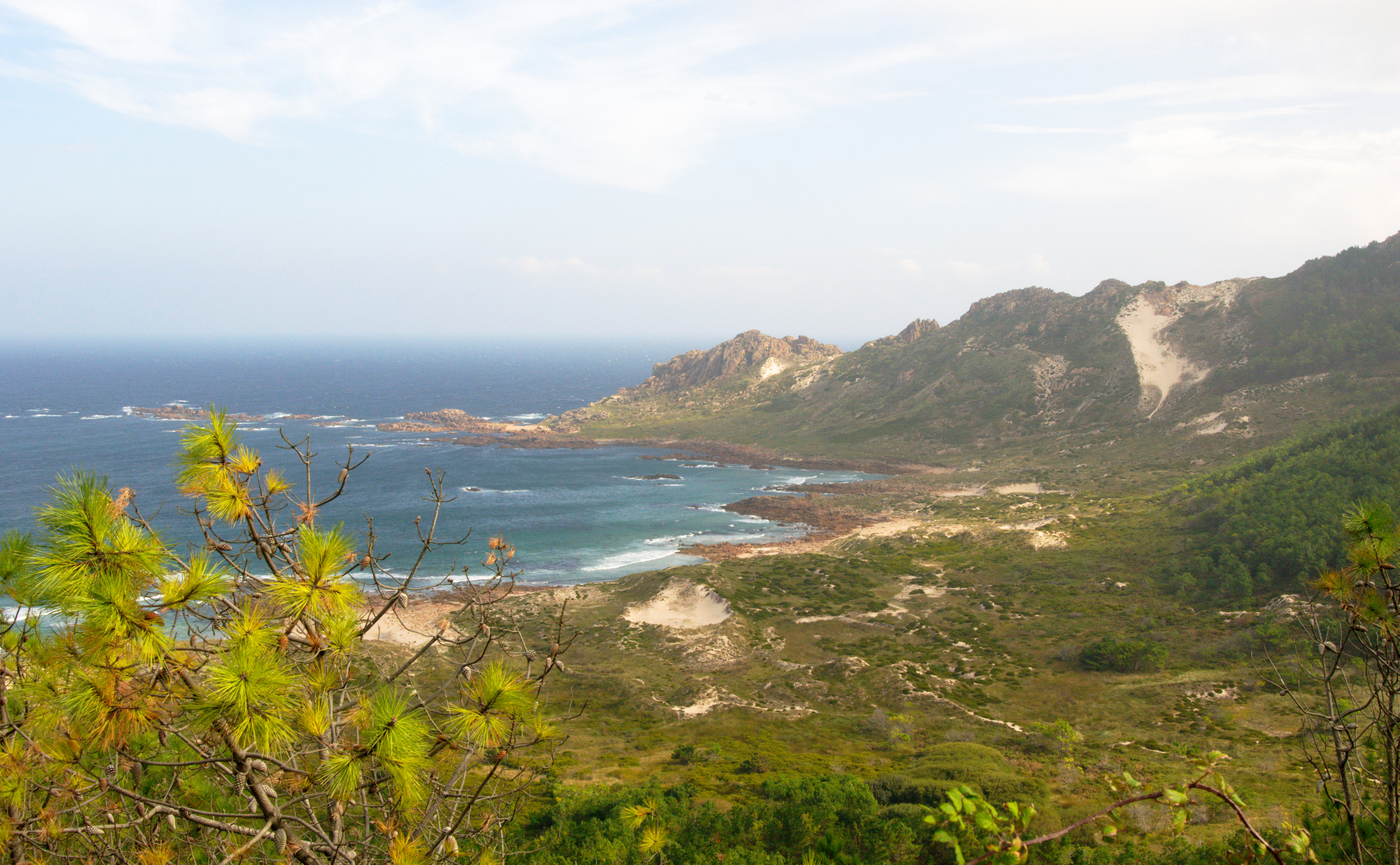 Dunas y reserva natural Arenal de Trece en la Costa da Morte, Galicia, cerca de Camariñas